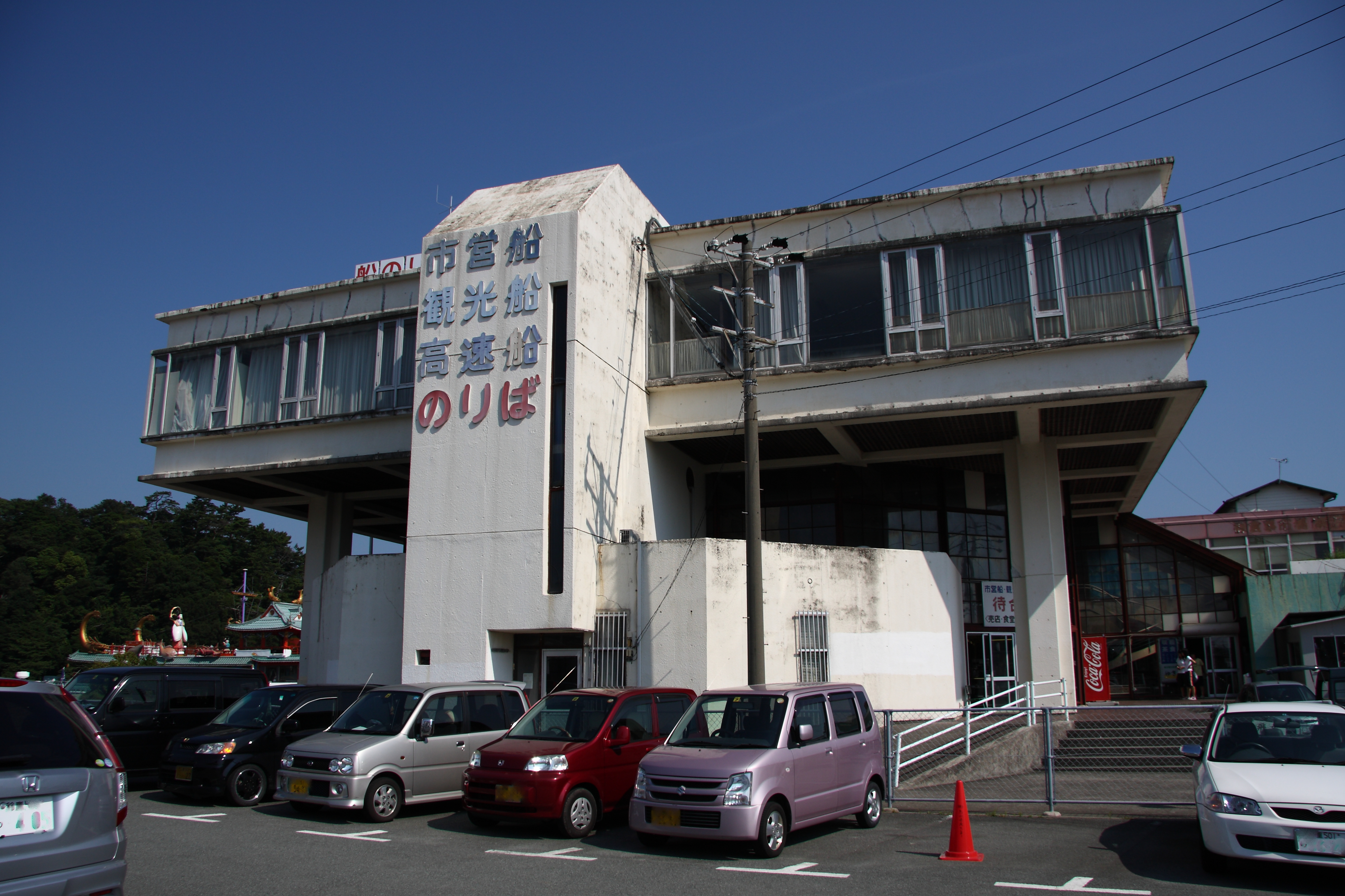 現.海上保安本部鳥羽海上保安部西側付近 Canon EOS 40D